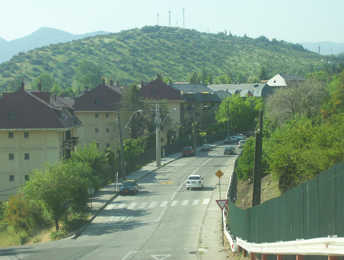 Avenida Vital Apoquindo , en Las Condes Chile